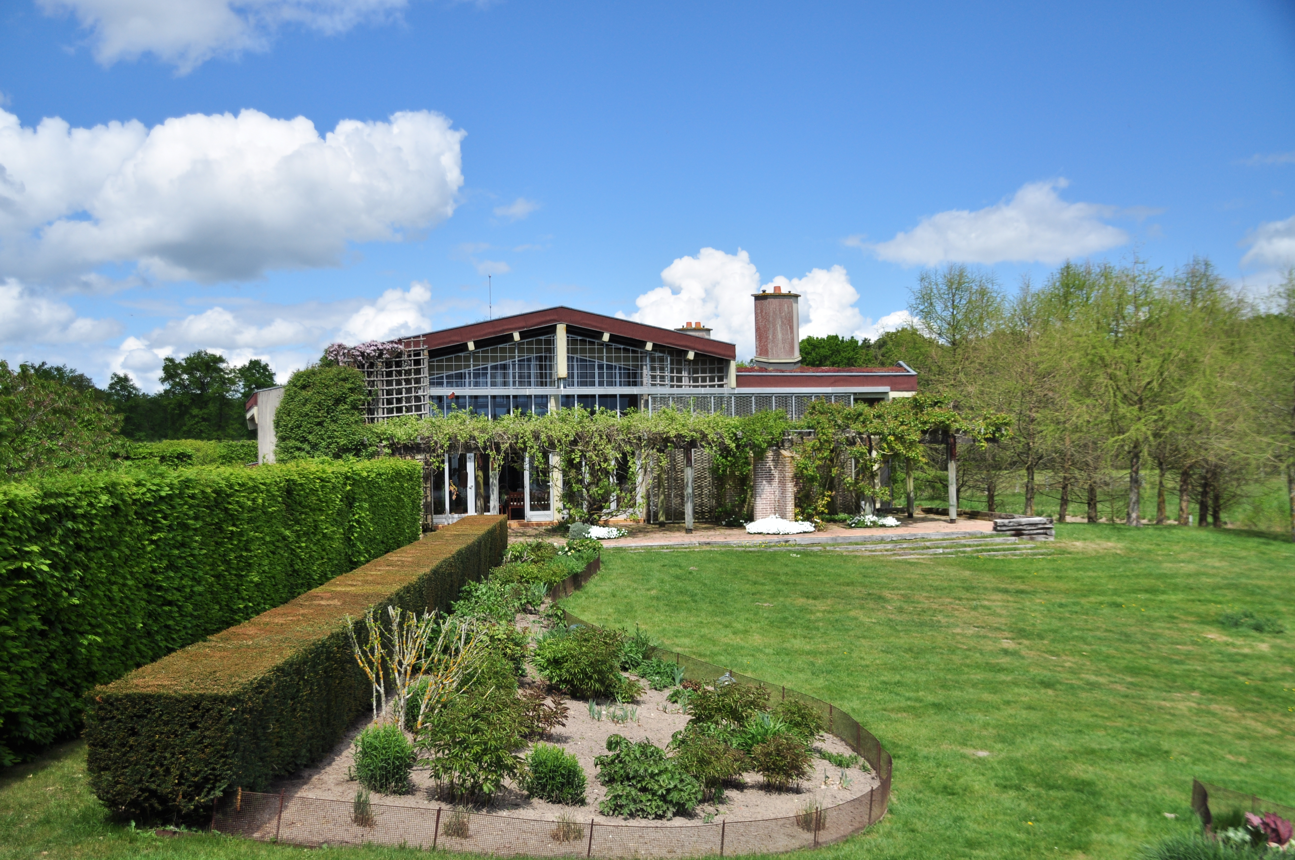 Propriété de La Triballe - Architecte Jean Kling 1995 Murs végétaux - Toits végétalisés